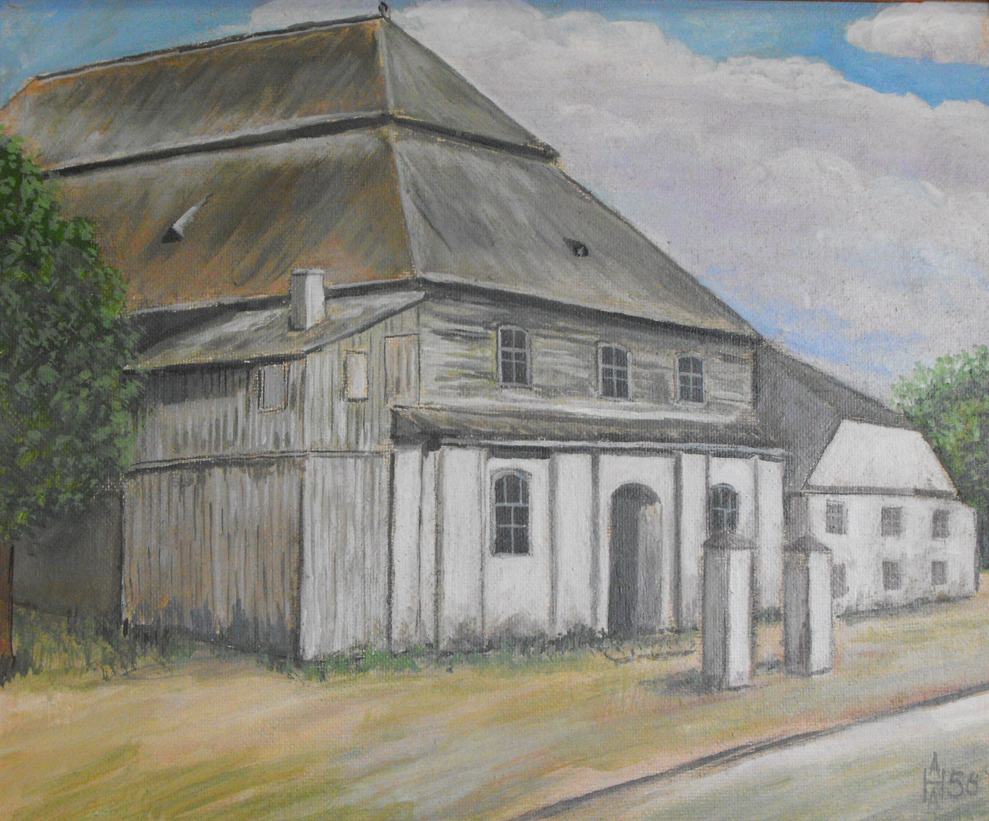 Синагога в Глубоком (Витебская область), 1956 год. Яичная темпера. ДВП. Художник Анатолий Александрович Наливаев.